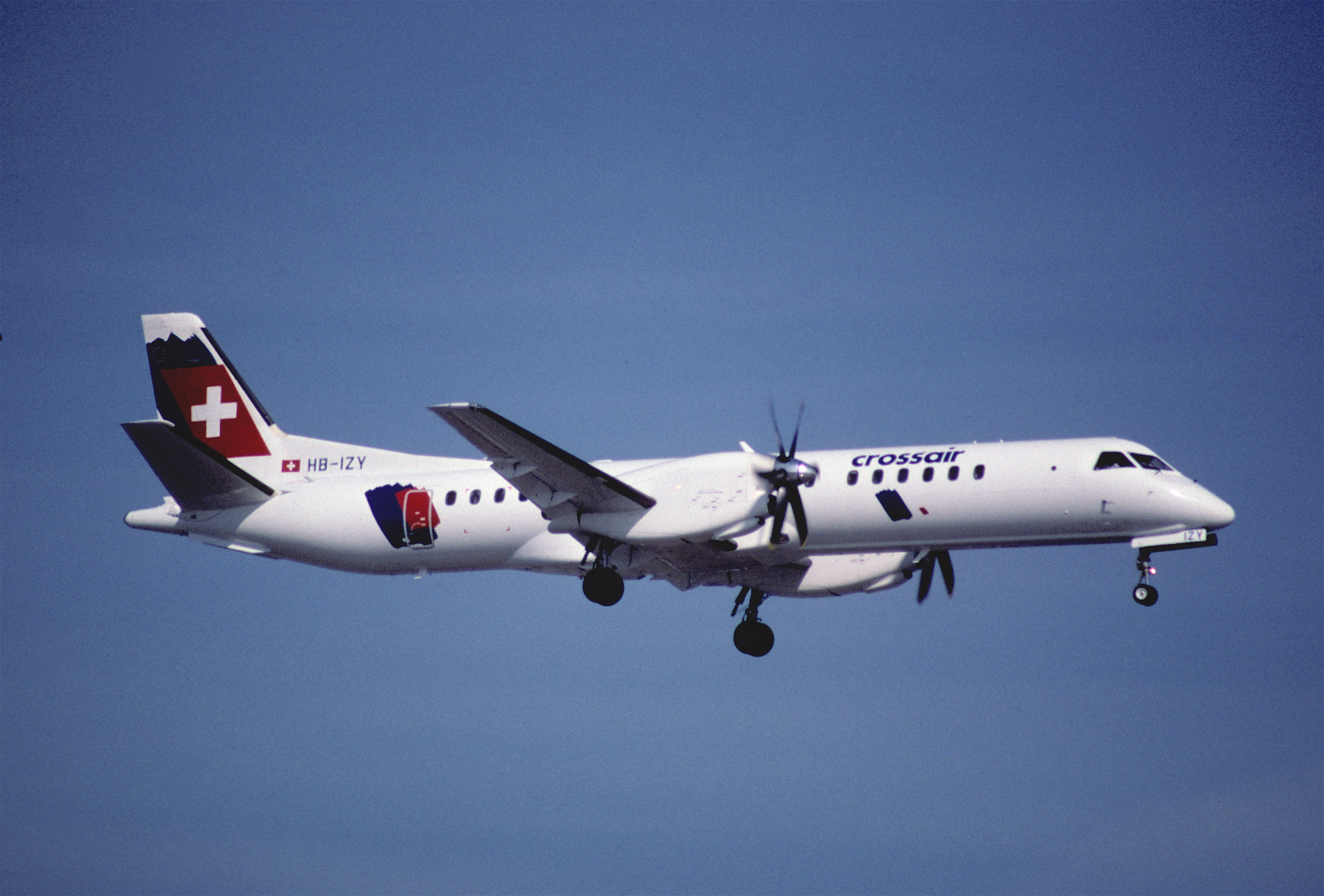 52bt - Crossair Saab 2000; HB-IZY@ZRH;27.02.1999